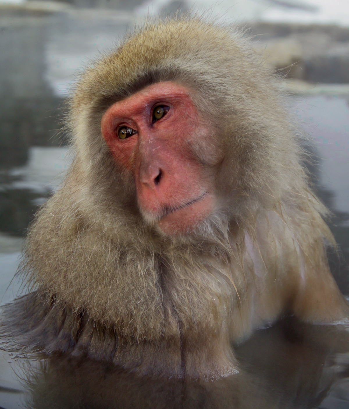 Japanese macaque Macaca fuscata Jigokudani Onsen, Yamanouchi, Nagano Prefecture, Japan